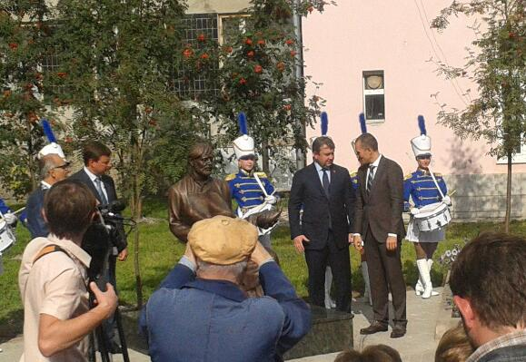 Торжественное открытие памятника сапожнику в городе Кимры Тверской области 9 сентября 2014 года.